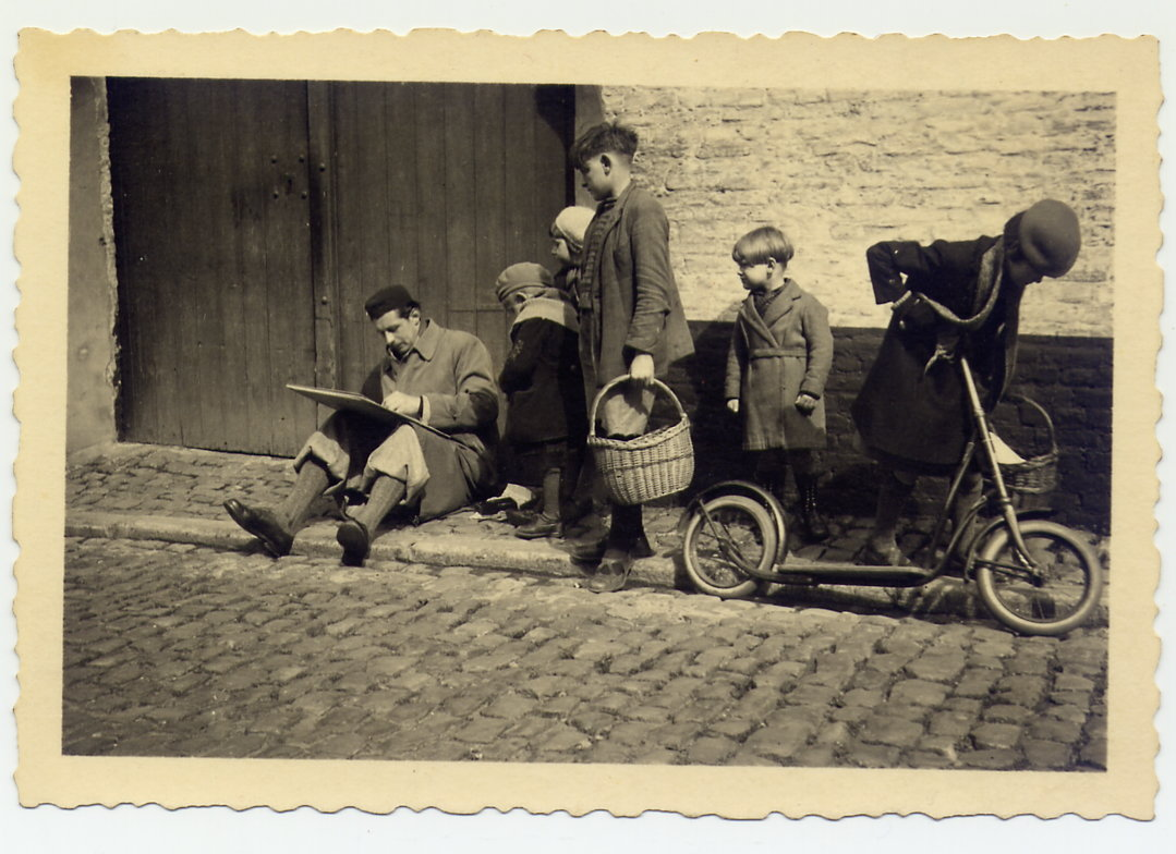 Lismonde dessinant l'église de Diest, 1936